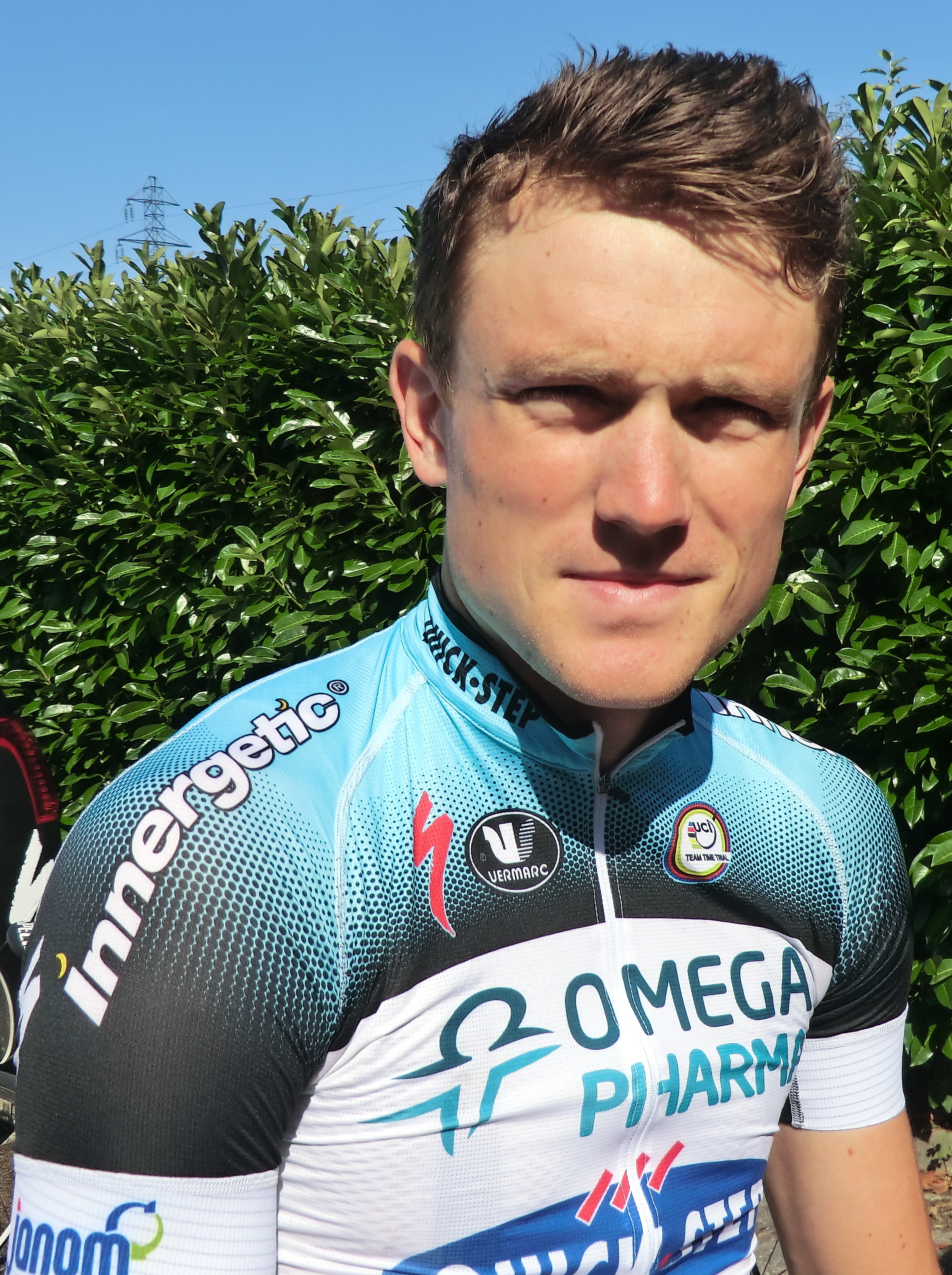 Coureurs à l'échauffement au matin du prologue du tour de l'Ain 2013, à l'hôtel Lyon-Est à Saint-Maurice-de-Beynost.